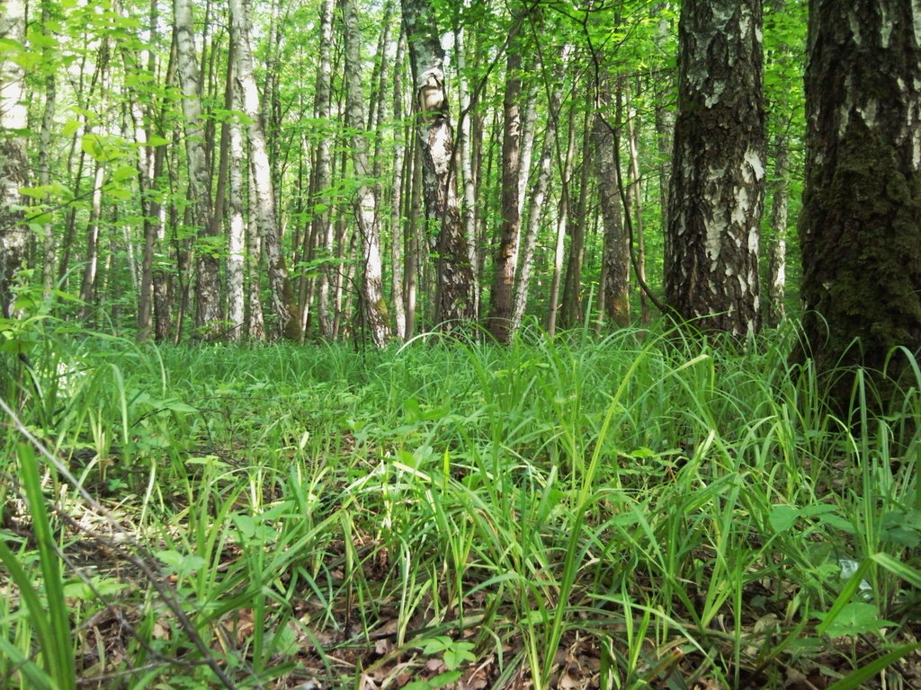 Бирюлёвский дендропарк весной